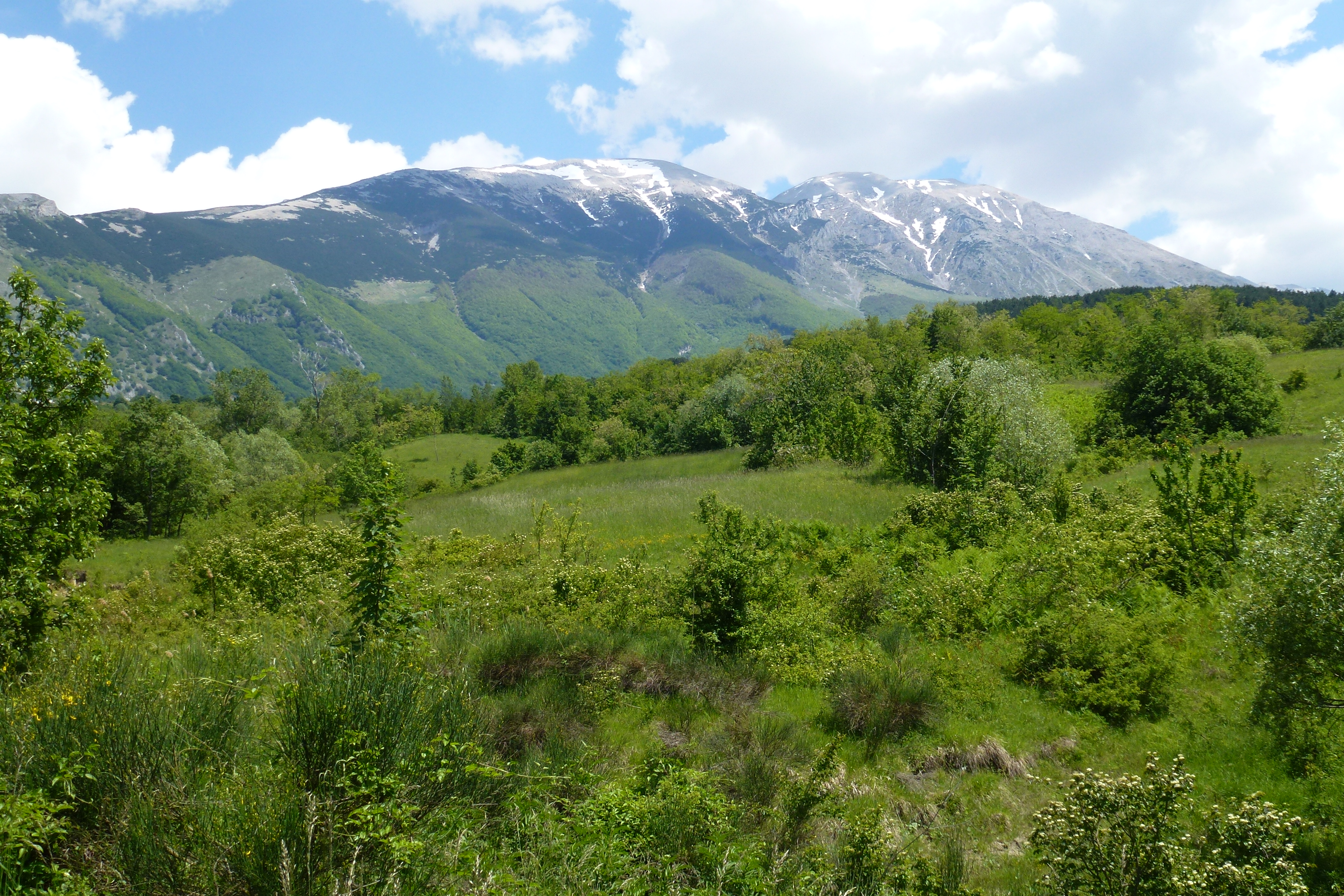 La Maiella vista dal versante ovest